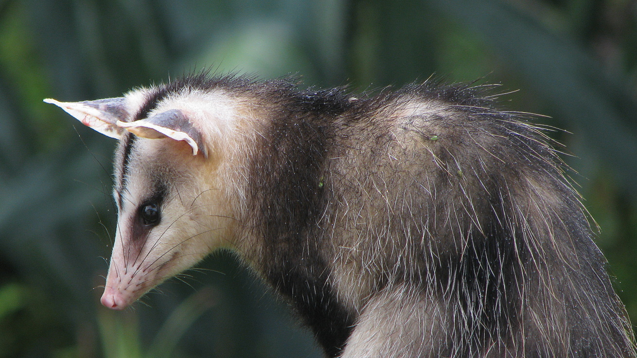 Didelphis albiventris (Lund, 1840)